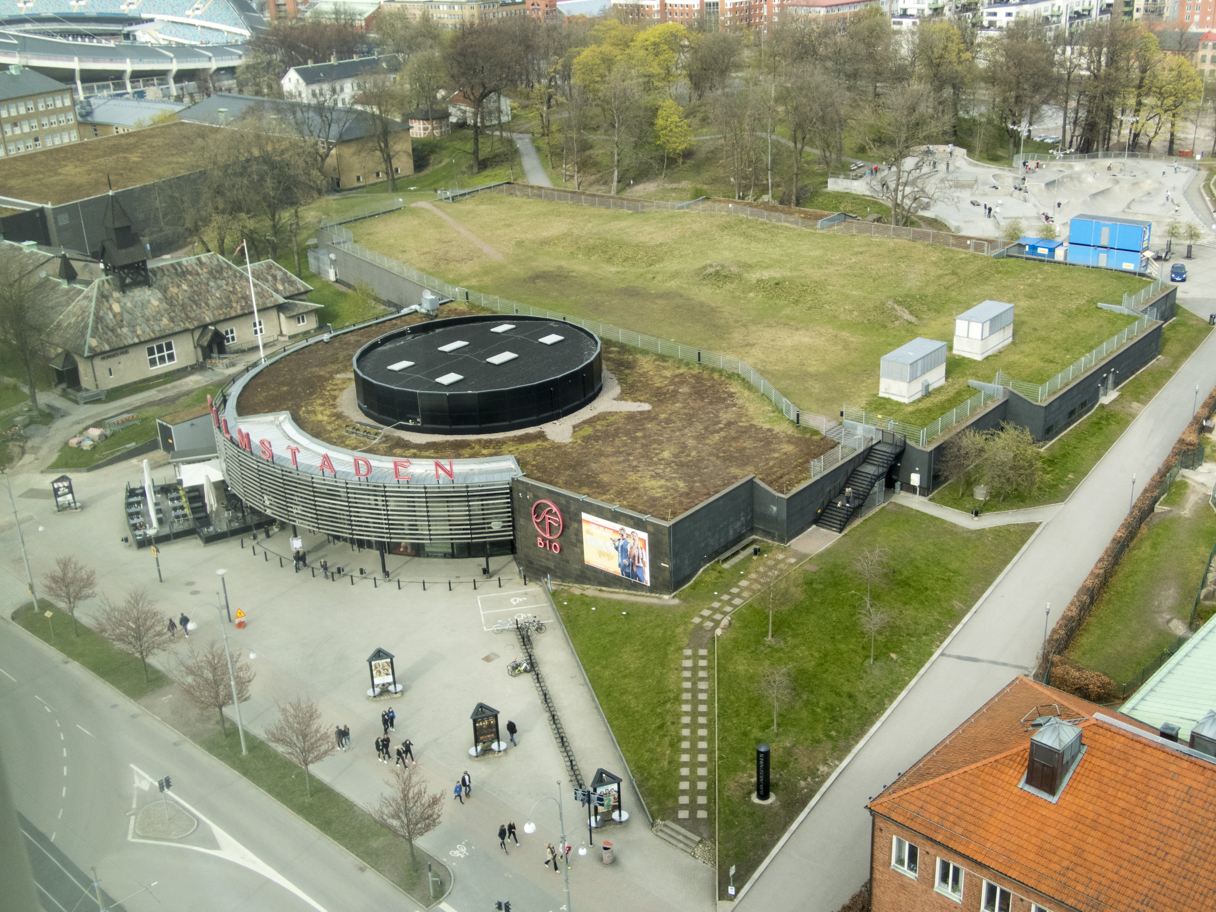 Filmstaden Bergakungen, invigd 2006. Arkitekt Håkan Cullberg